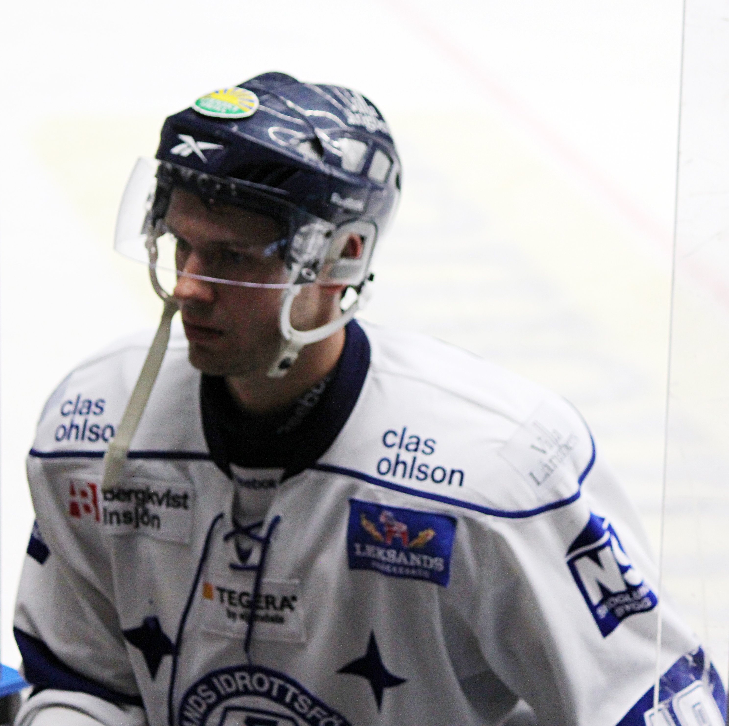 Jared Aulin för Leksands IF mot VIK Västerås HK 29 januari 2011.